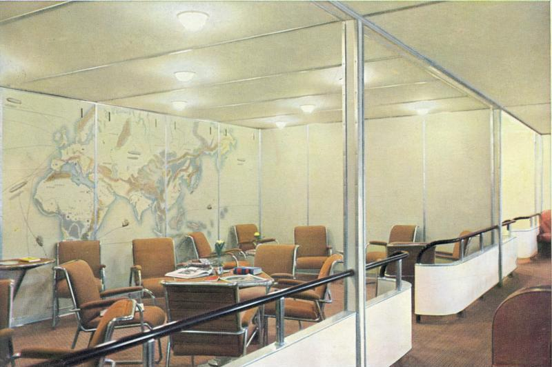 Luftschiff Hindenburg (LZ-129), Gesellschaftsraum Gesellschaftsraum im Luftschiff "Hindenburg"